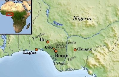 Kaart Edo in Nigeria